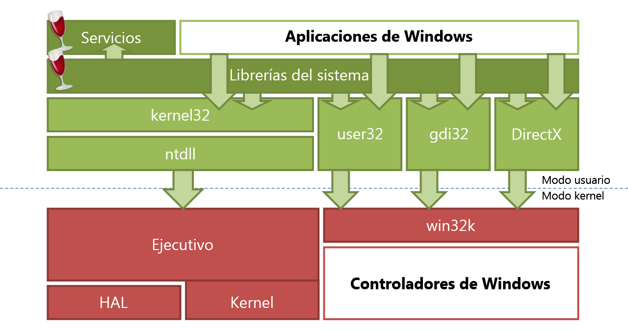 Cómo el proyecto ReactOS usa internamente el código de Wine